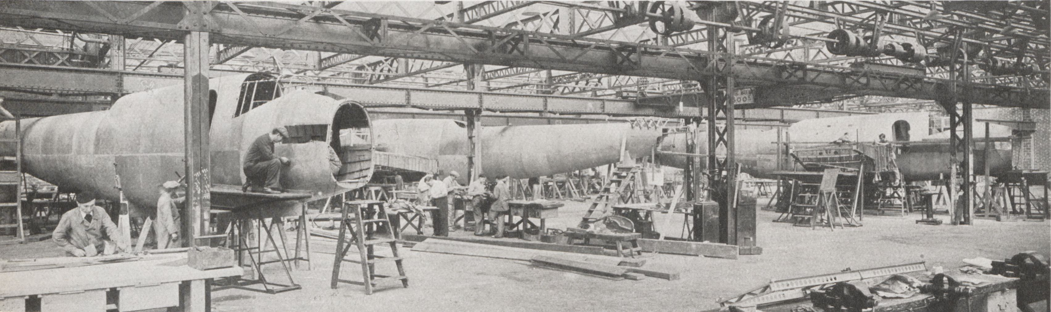 Construction en série de fuselages de LeO 45 dans l'usine que possède la S. N. C. A. DU SUD-EST à Clichy.